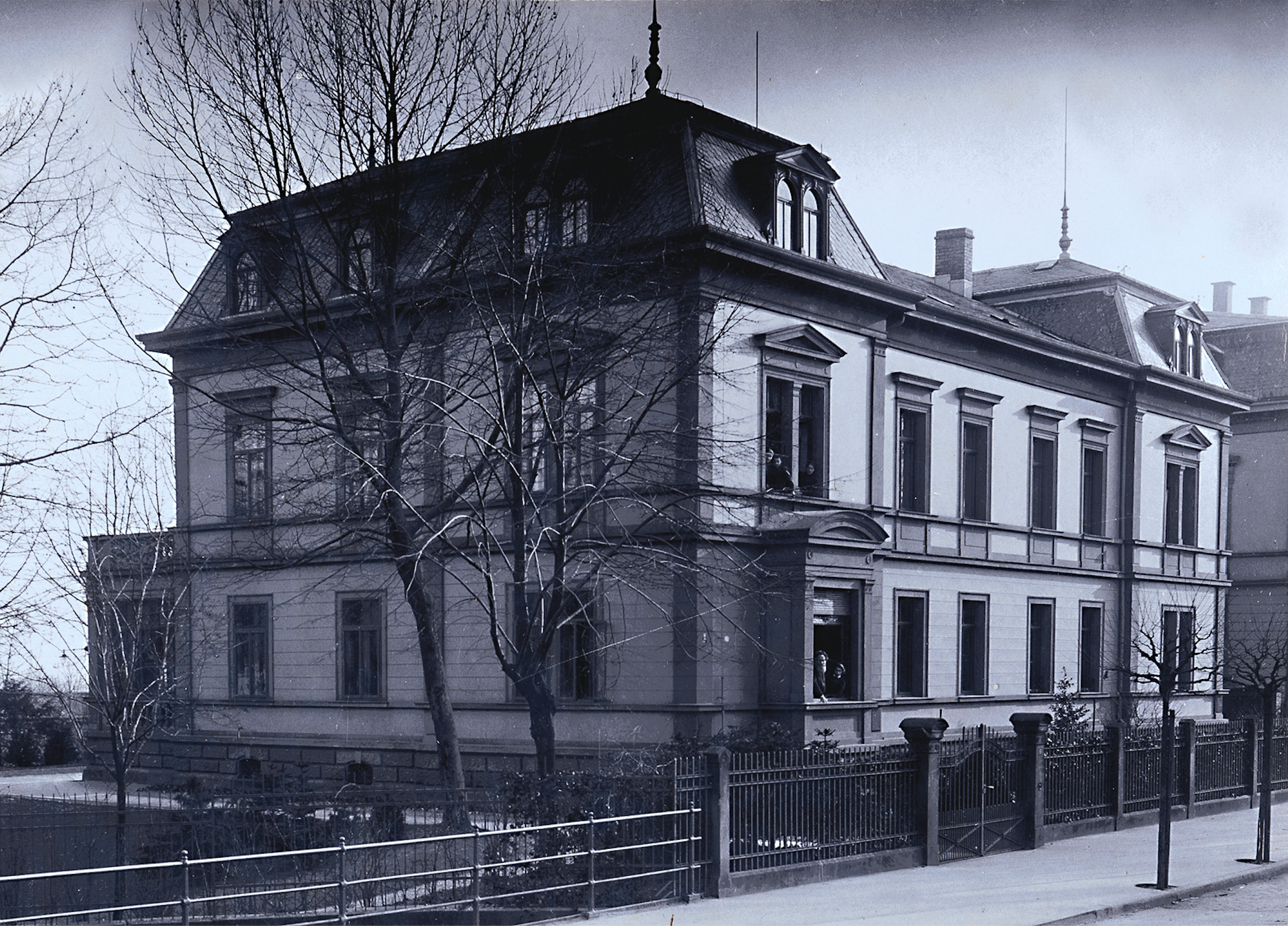 Villa des Industriellen (Frankenthalsche Zuckerfabriken) und Kommerzienrates Christoph Friedrich Fanck (1846–1906) und dessen Ehefrau Karolina Ida (1858–1957), geborene Paraquin. Ihre Kinder waren Marie (* 24. August 1882), Ernst (* 18. Januar 1884; † 31. Juli 1884), Helene (* 21. November 1886; † 4. Dezember 1979), Ernestine Elisabeth (* 23. März 1888; † 15. April 1940) und Arnold Heinrich Fanck (* 6. März 1889; † 28. September 1974) – Fünf Familienmitglieder schauen aus zwei geöffneten Fenstern im Erdgeschoss und in der ersten Etage, eines ihrer Kinder war wenige Monate nach der Geburt verstorben, ein anderes (Arnold) zu dieser Zeit (1899 bis 1903) evtl. im Lungensanatorium Fridericianum in Davos, Kanton Graubünden, Schweiz.